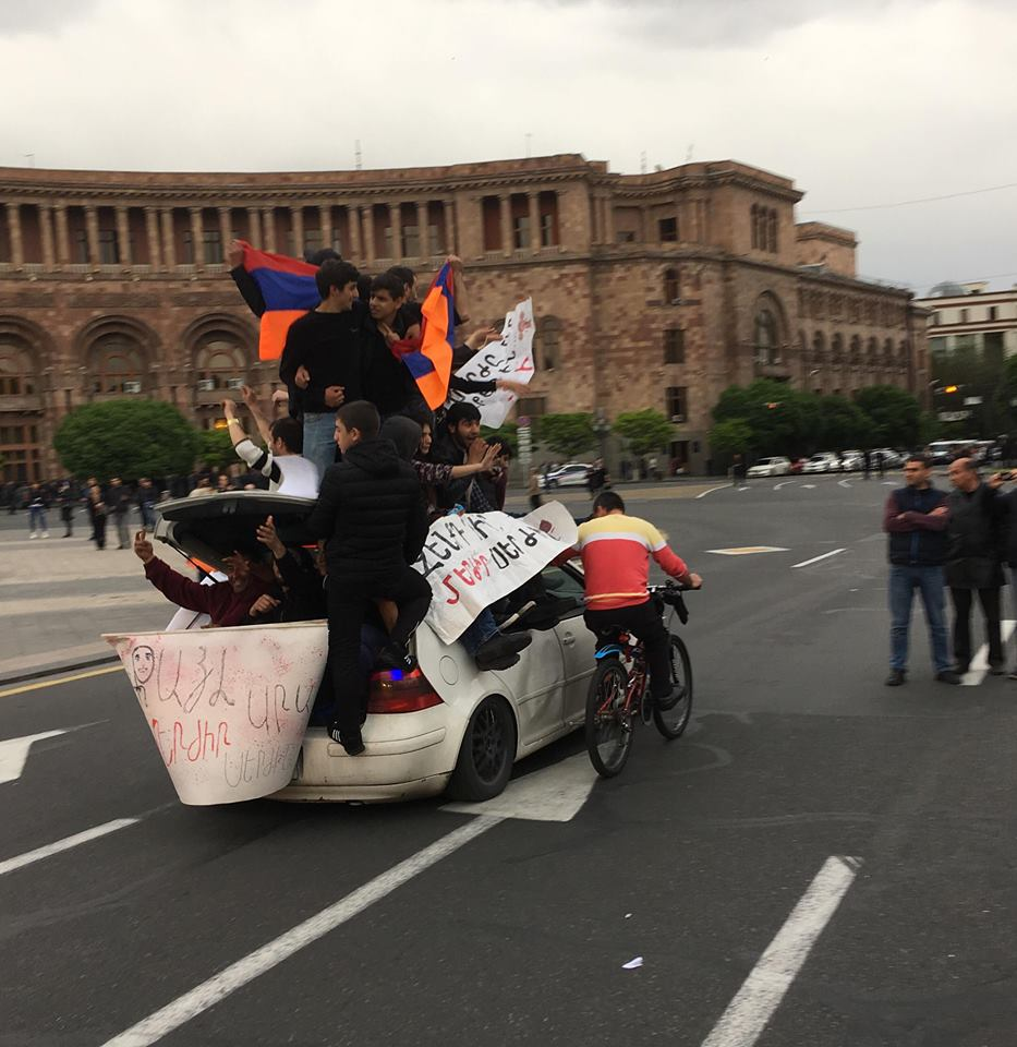 Բողոքի ցույց Հանրապետության հրապարակում